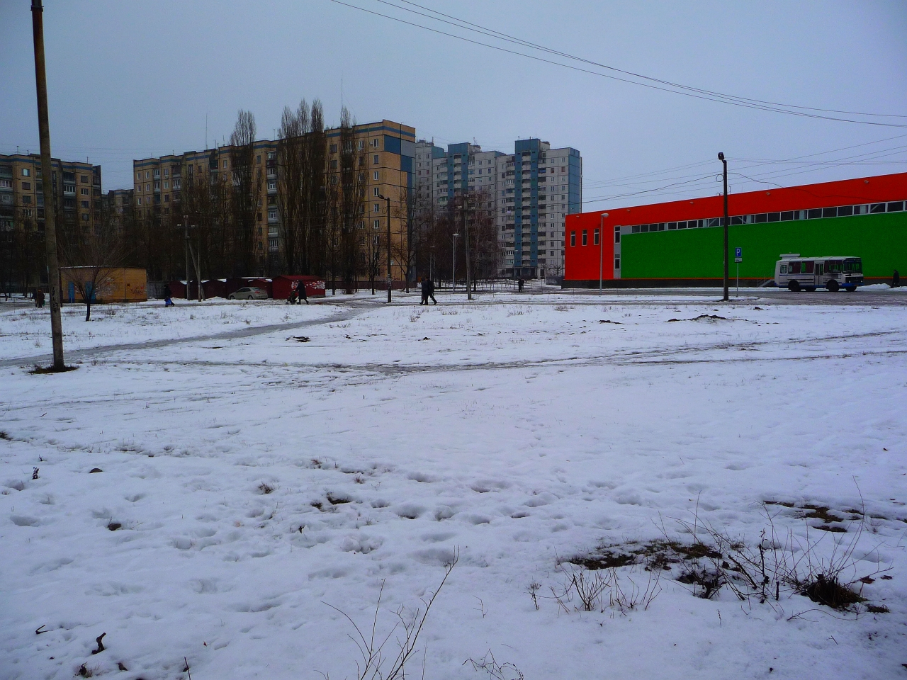 Фреш и 5-й Заречный